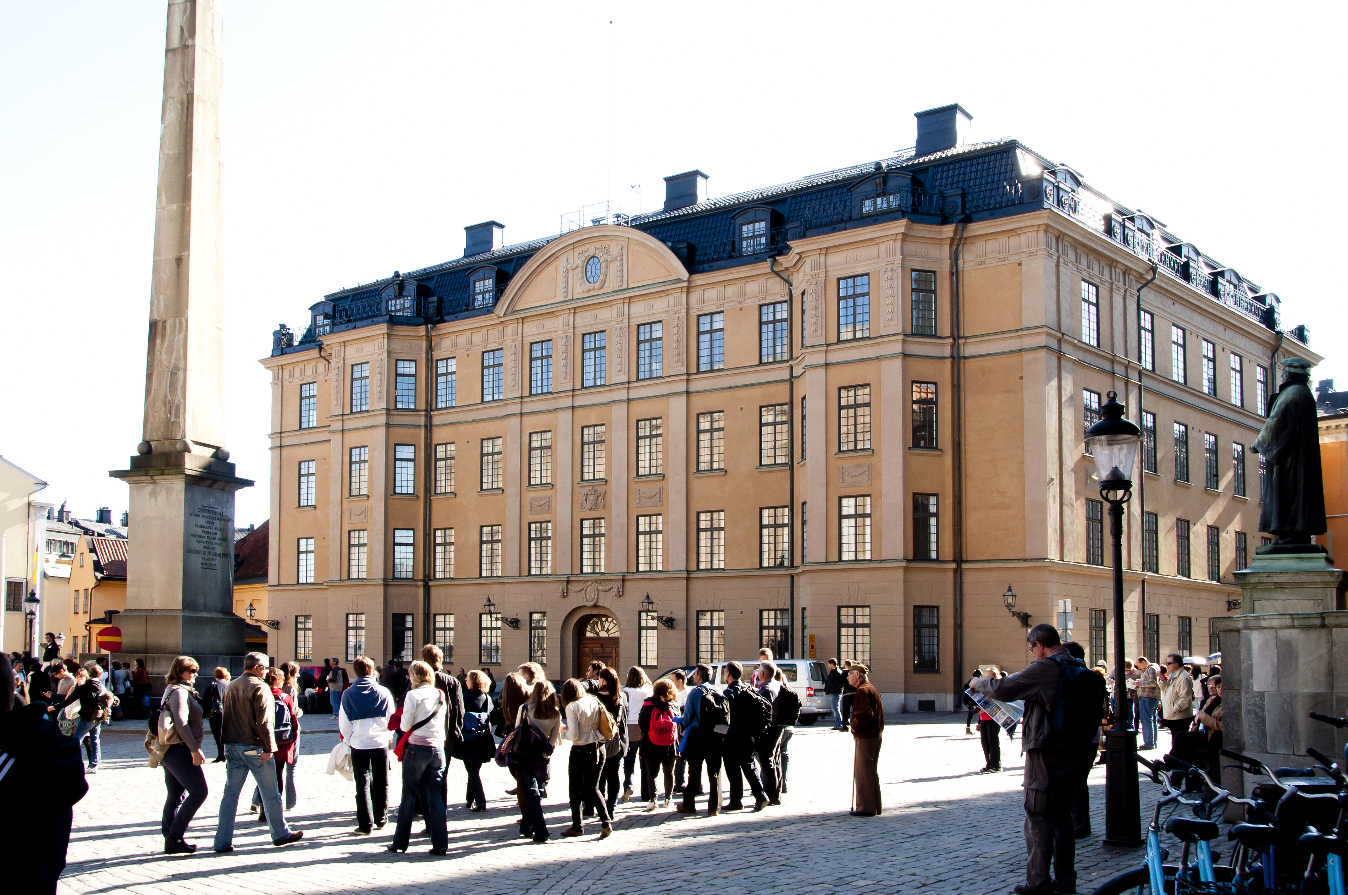 Hovförvaltningens hus, Slottsbacken 2. Byggnadsår 1911-12. Arkitekt Erik Josephson